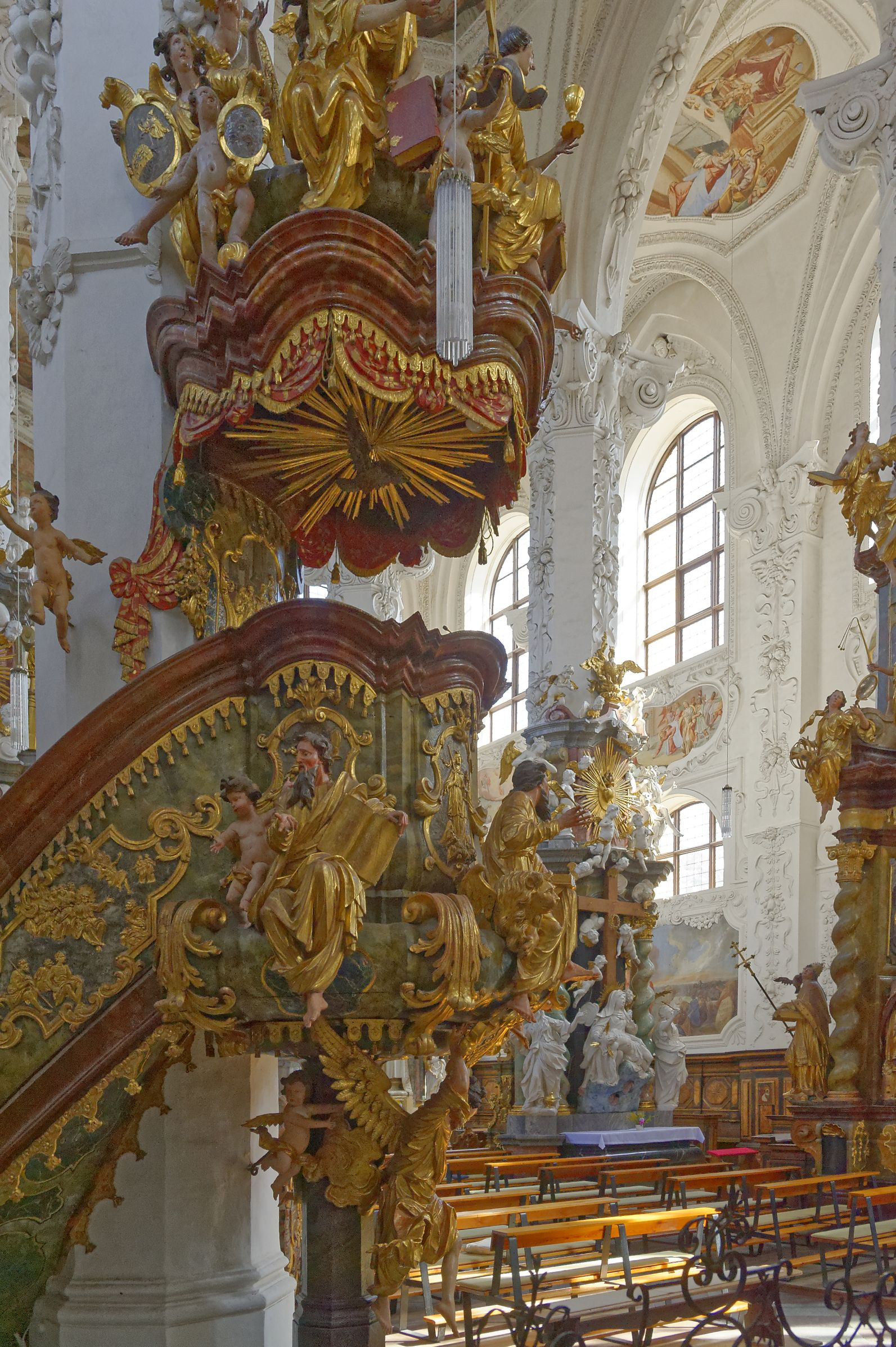 Kloster Neuzell - 2016